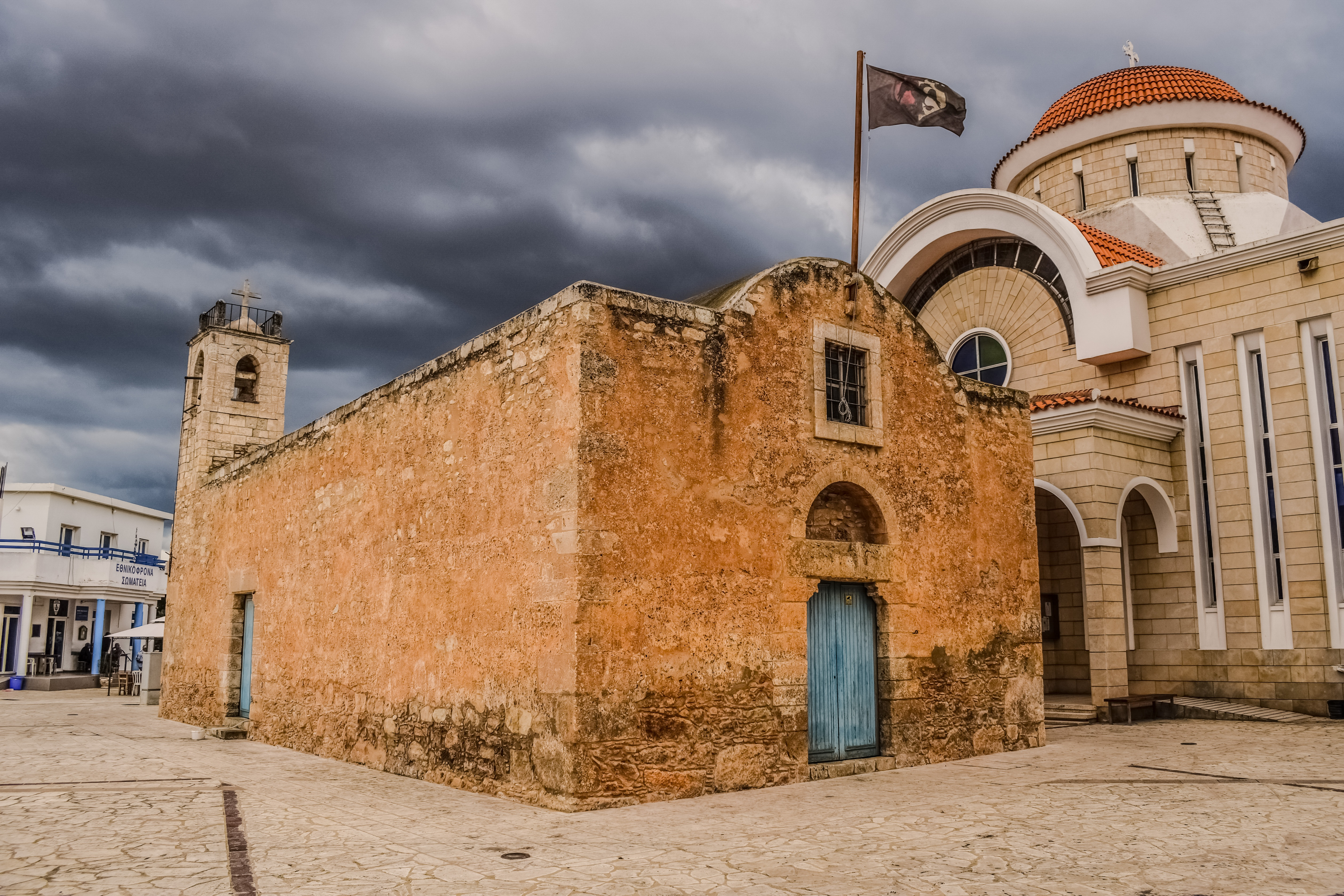 Ксилофагу. Церковь